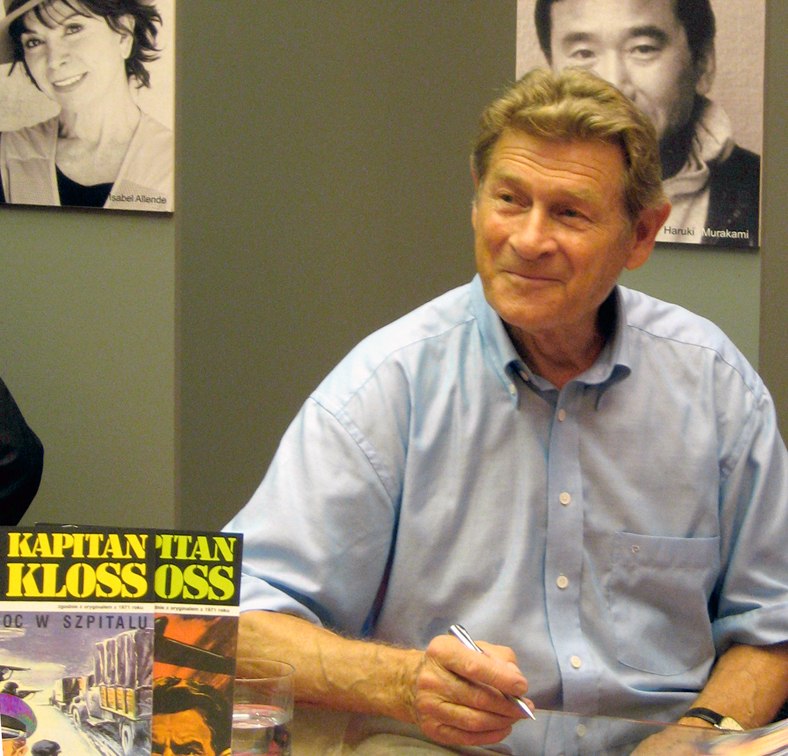 53. Międzynarodowe Targi Książki w Warszawie - Stanisław Mikulski podpisuje komiksy "Kapitan Kloss" (2008-05-17).